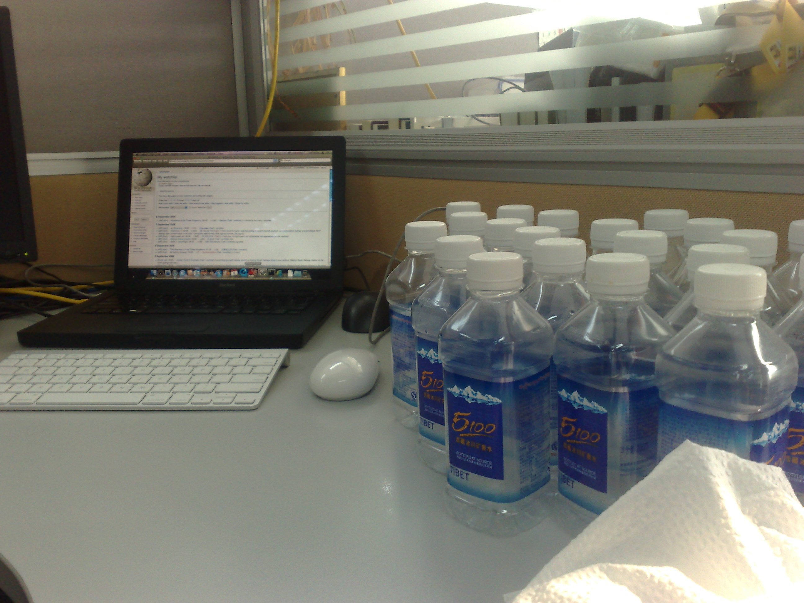 5100西藏冰川矿泉水